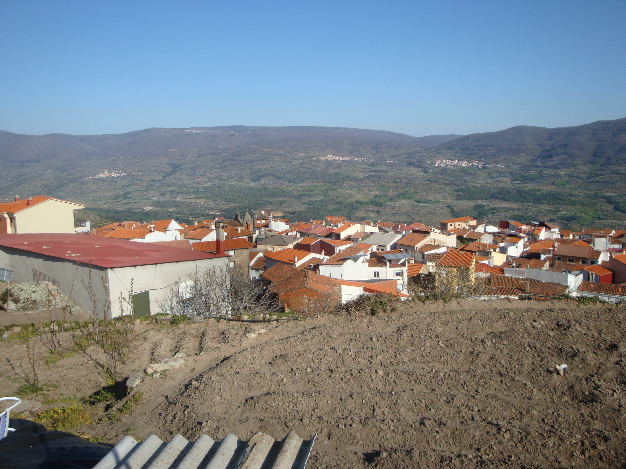 El Torno (Cáceres) visto desde La Lanchilla